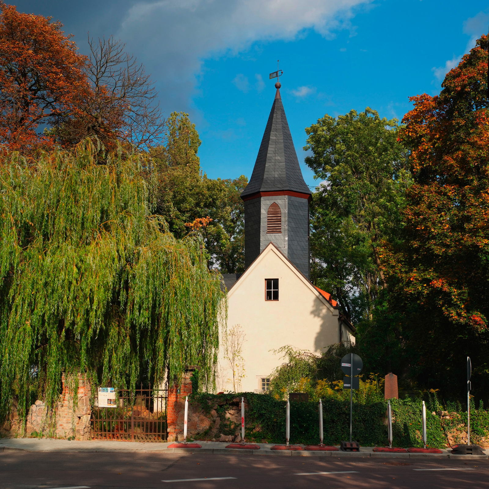 Kirche in Halle-Diemitz